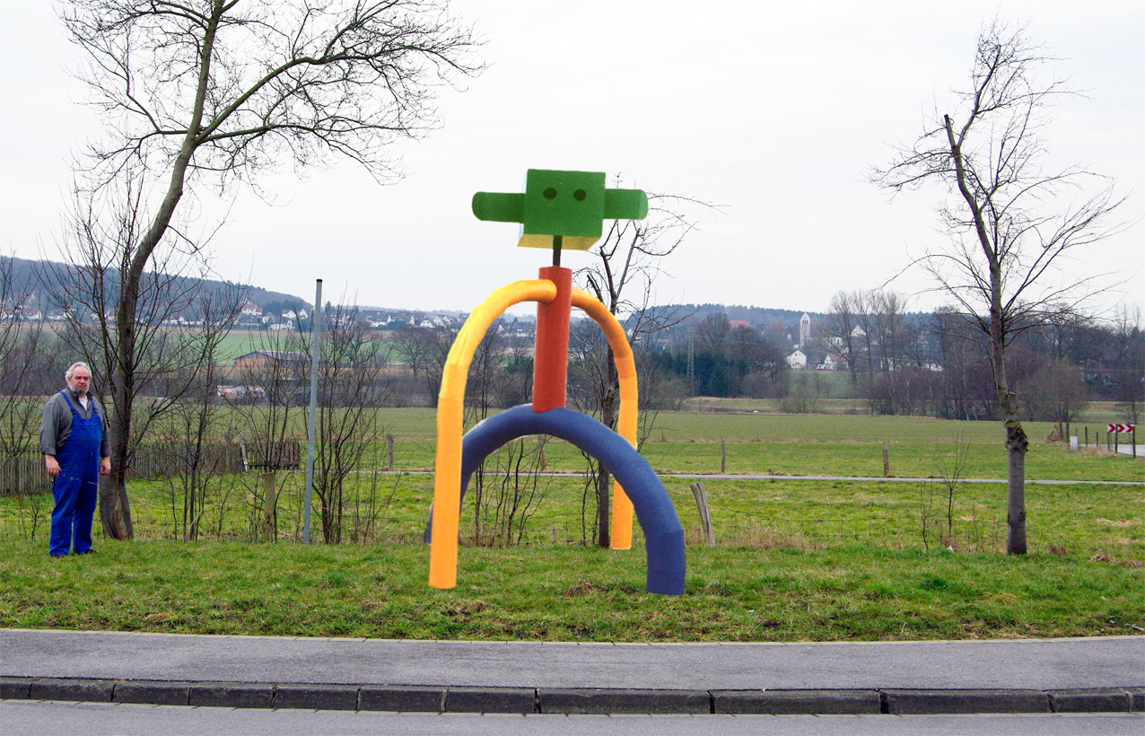 Winnie, das Recyclingwesen. Aus alten Gas- und Wasserrohren zusammen gesetzt mit windempfänglichem beweglichem Kopf, symbolisiert die Energien Strom, Wasser, Gas und Wind und steht besonders stabil.